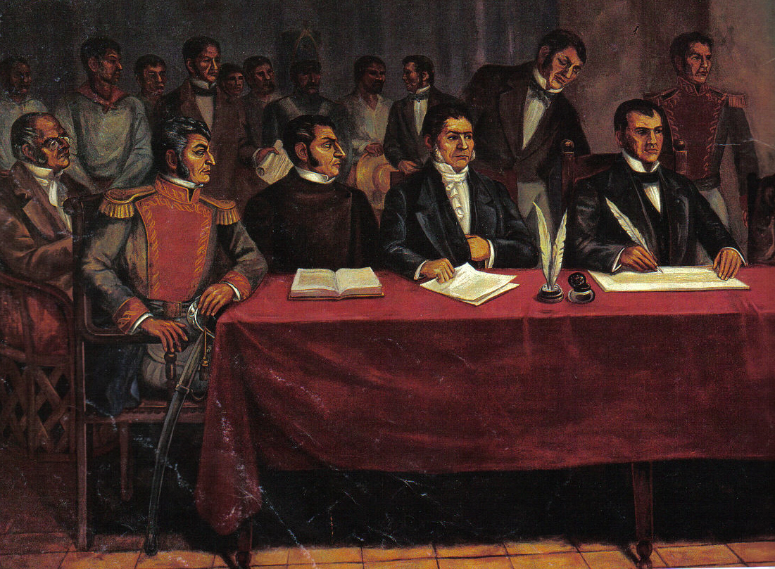 Flag Of Morelos